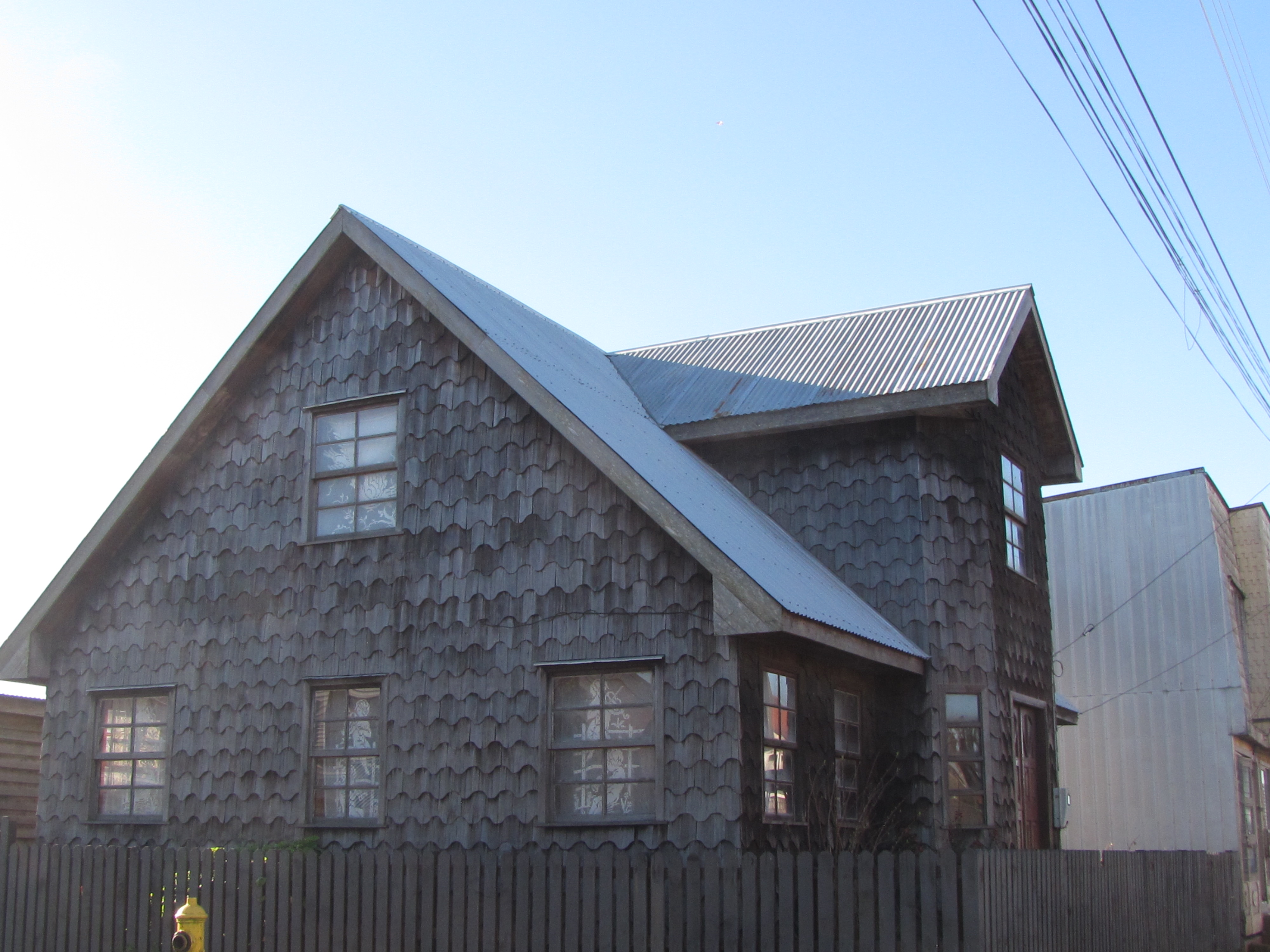 Casa revestida de tejuelas de alerce (Fitzroya cupressoides) en Achao, Quinchao, Chile.